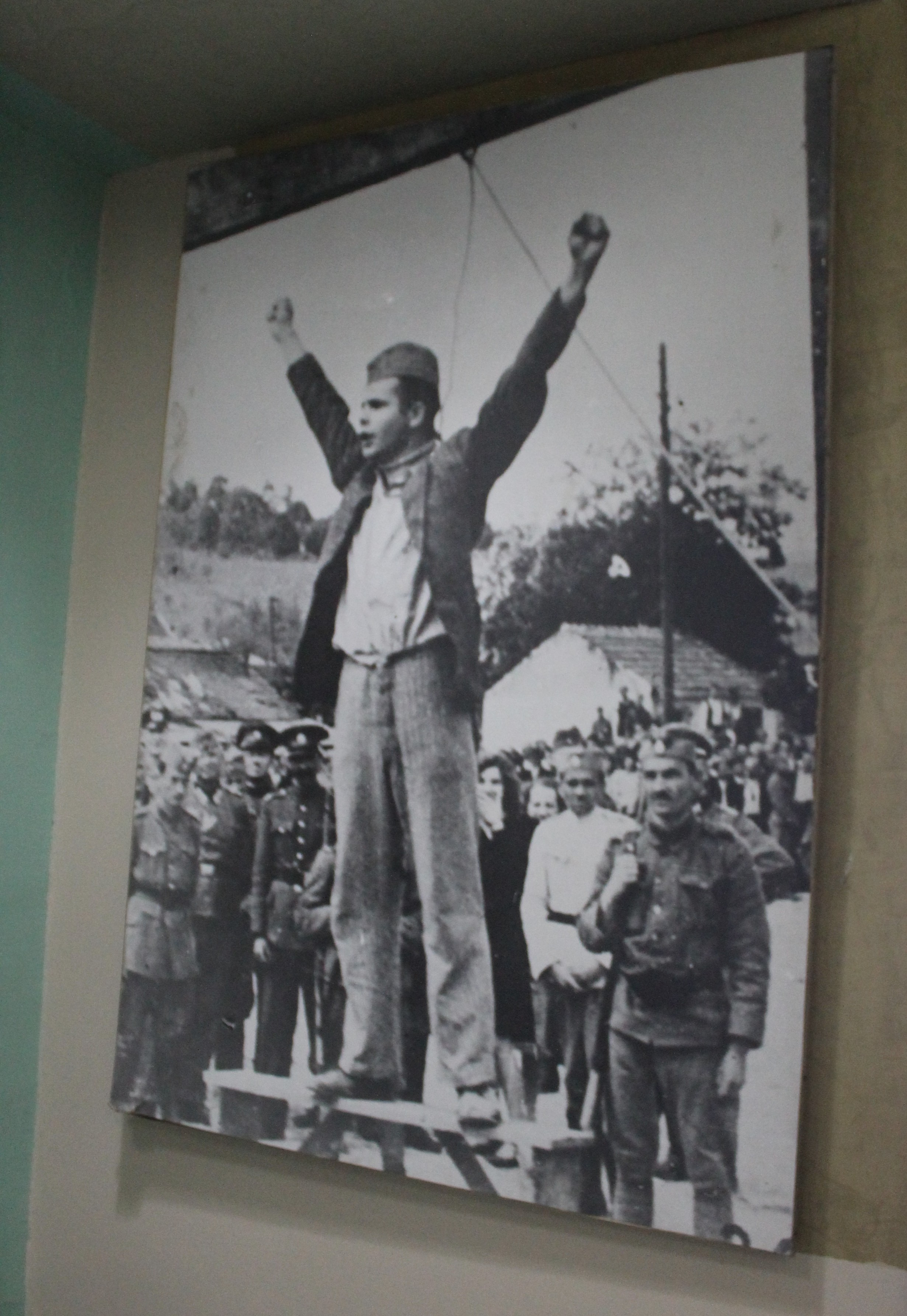 Fotografija vešanja Steve Filipovića u Vojnom muzeju u Beogradu